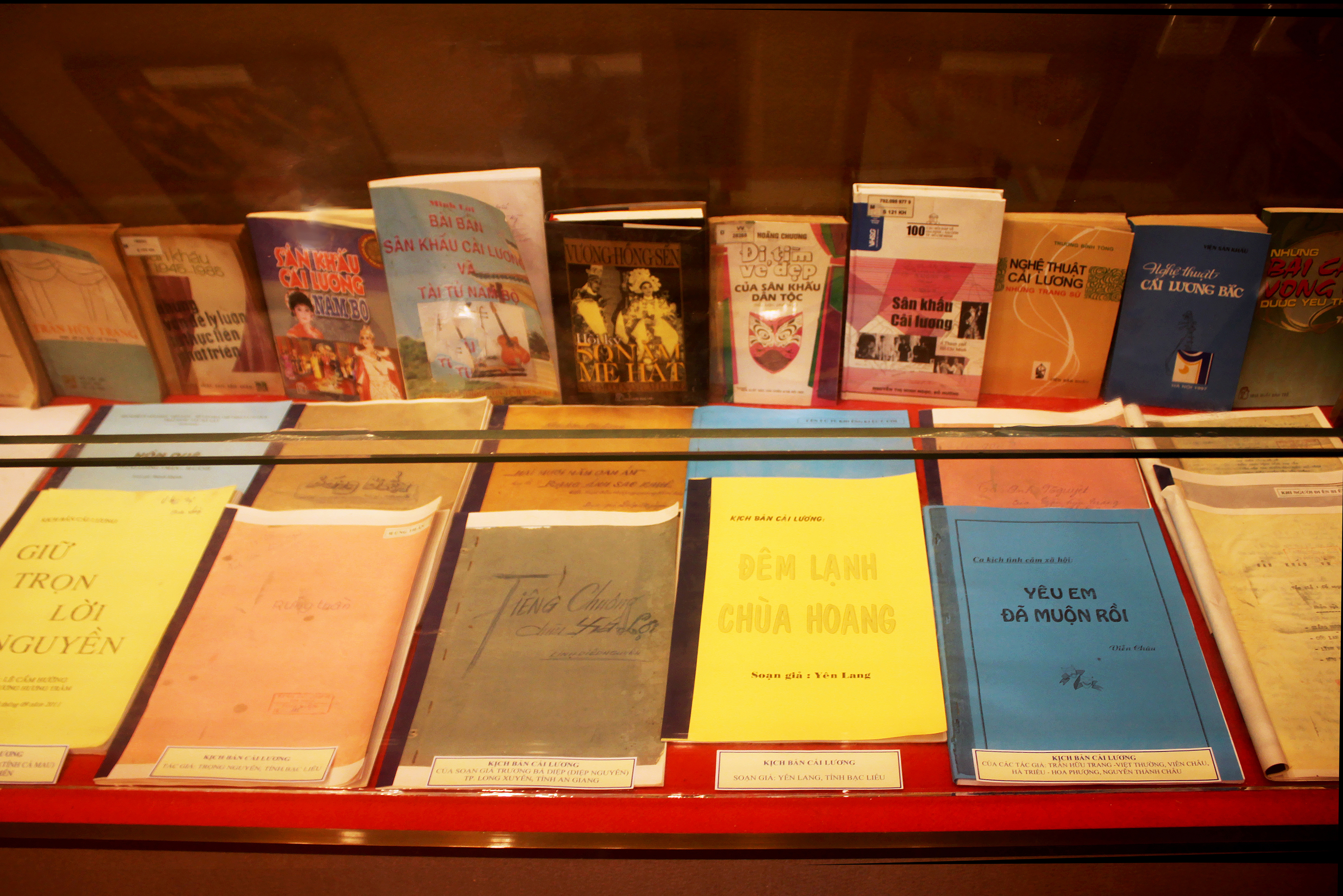 Sách viết về loại hình nghệ thuật cải lương và một số vở tuồng cải lương ở miền Nam Việt Nam.